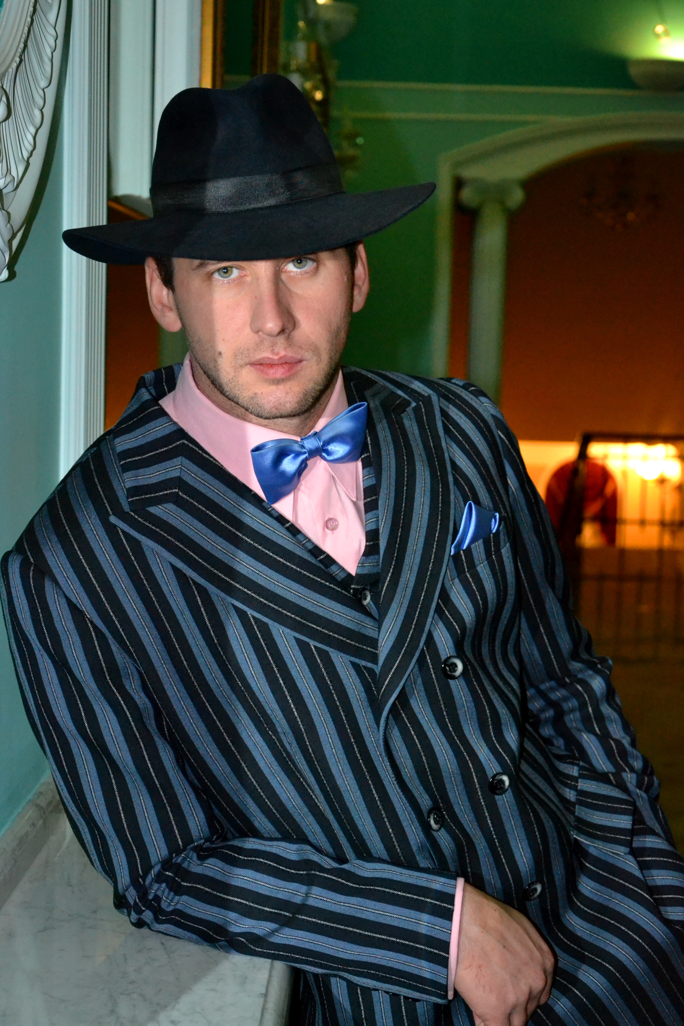 Максим Булгаков в Национальной оперетте Украины, 3 этаж (коридорчик, ведущий на ярус). В образе Палаццо, в день показа мюзикла "Sugar, или В джазе только девушки".